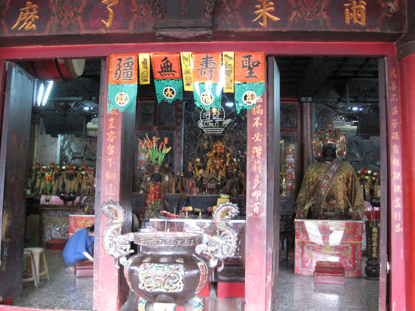 臺南首邑縣城隍廟正門